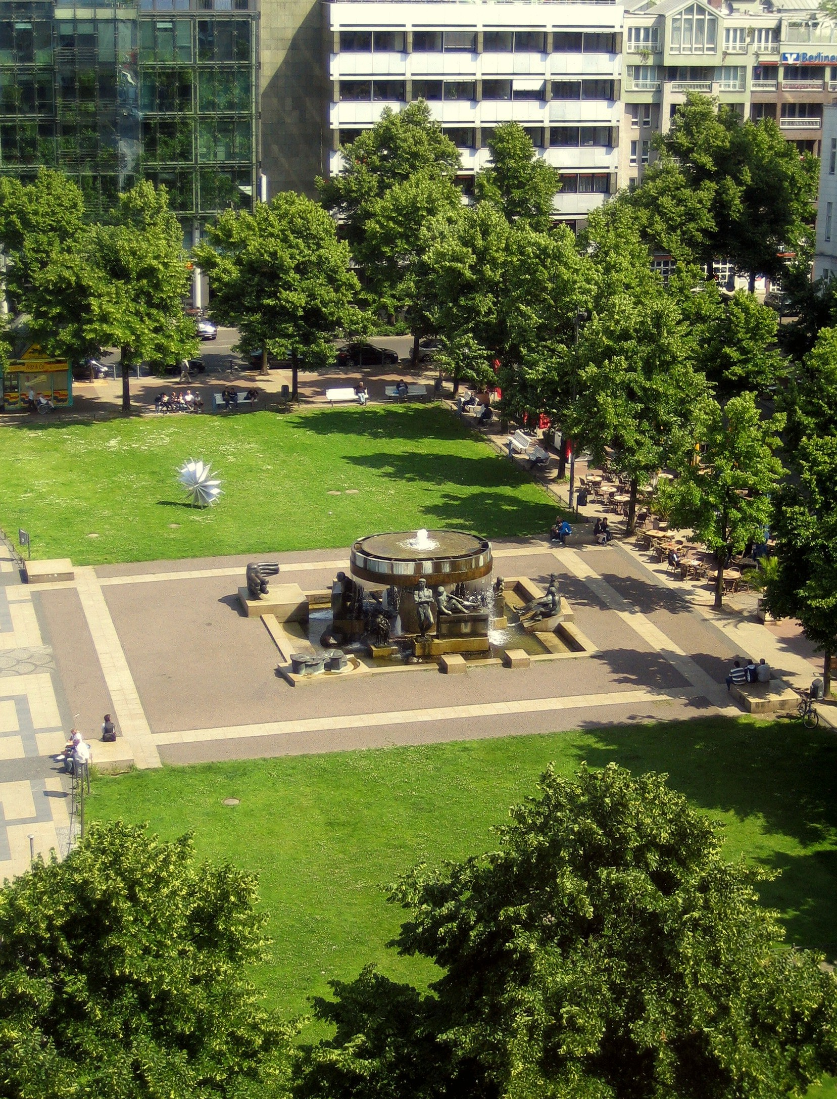 Der Wittenbergplatz in Berlin, südliche Hälfte, mit dem Brunnen von Waldemar Grzimek.